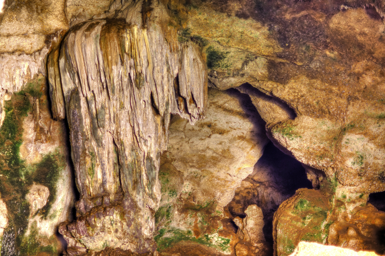 Nahal Sfunim Cave Inside picture- Mount Carmel Israel מערת ספונים בנחל ספונים בכרמל - תמונת נטיפים בתוך המערה